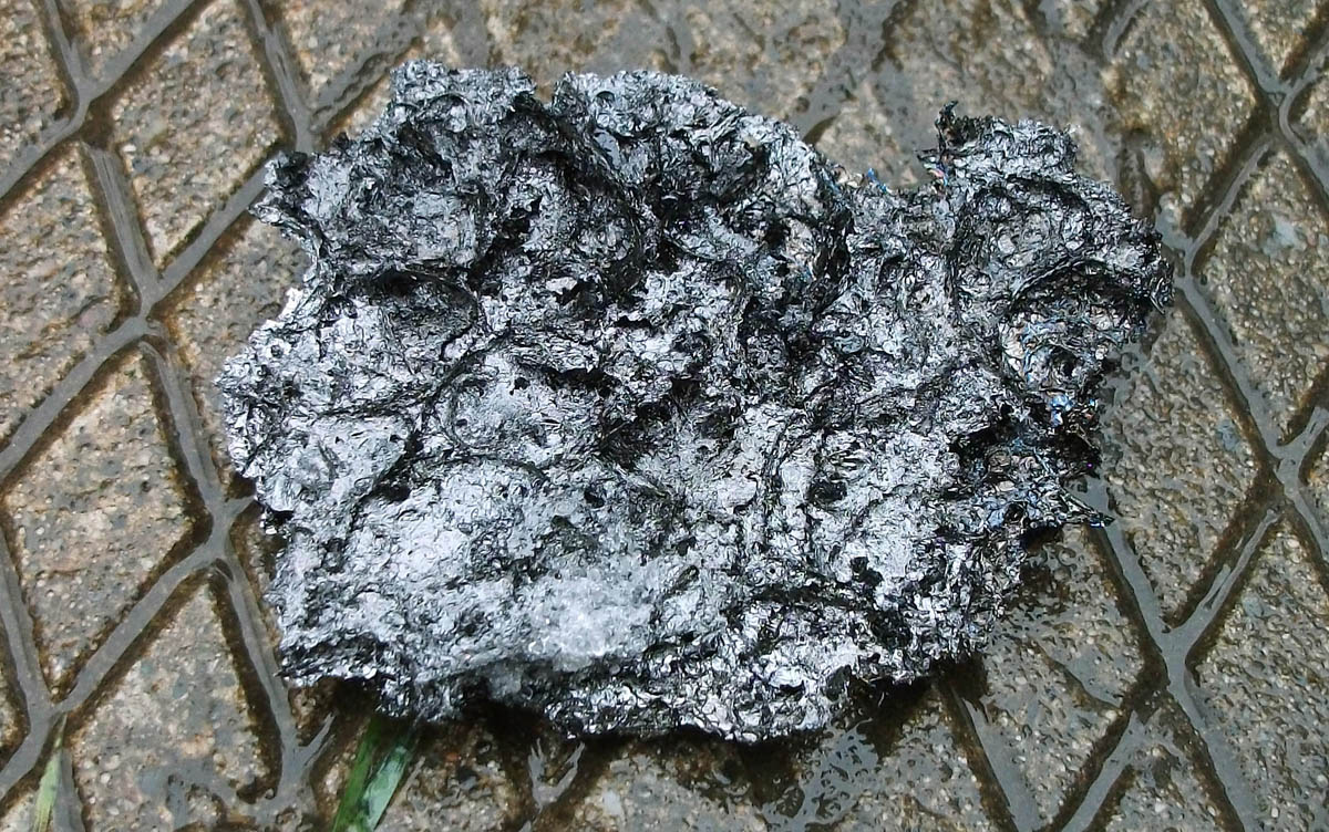 Créosote